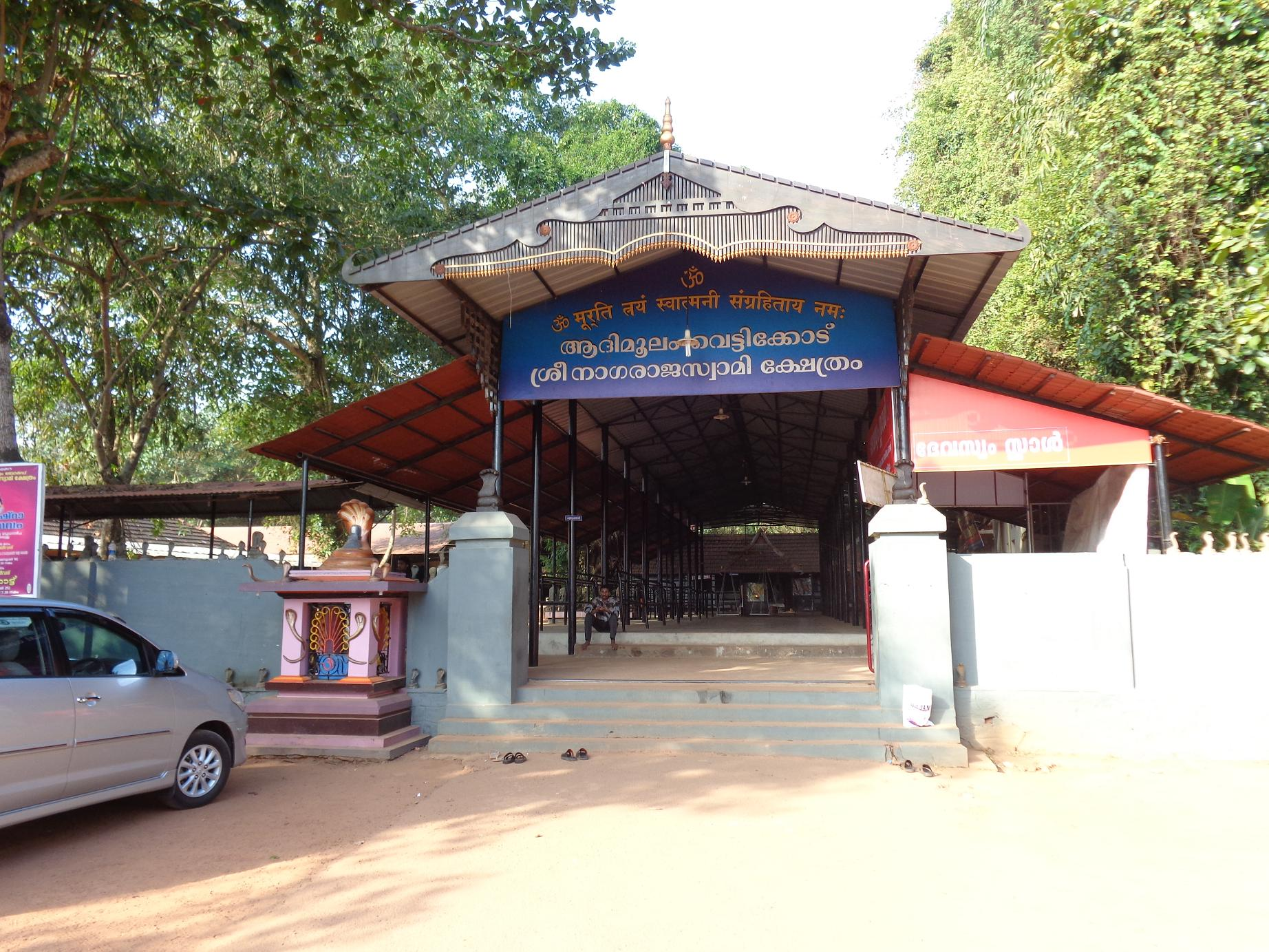 vettikkot adimoolam nagaraja temple, kaattanam, kayamkulam